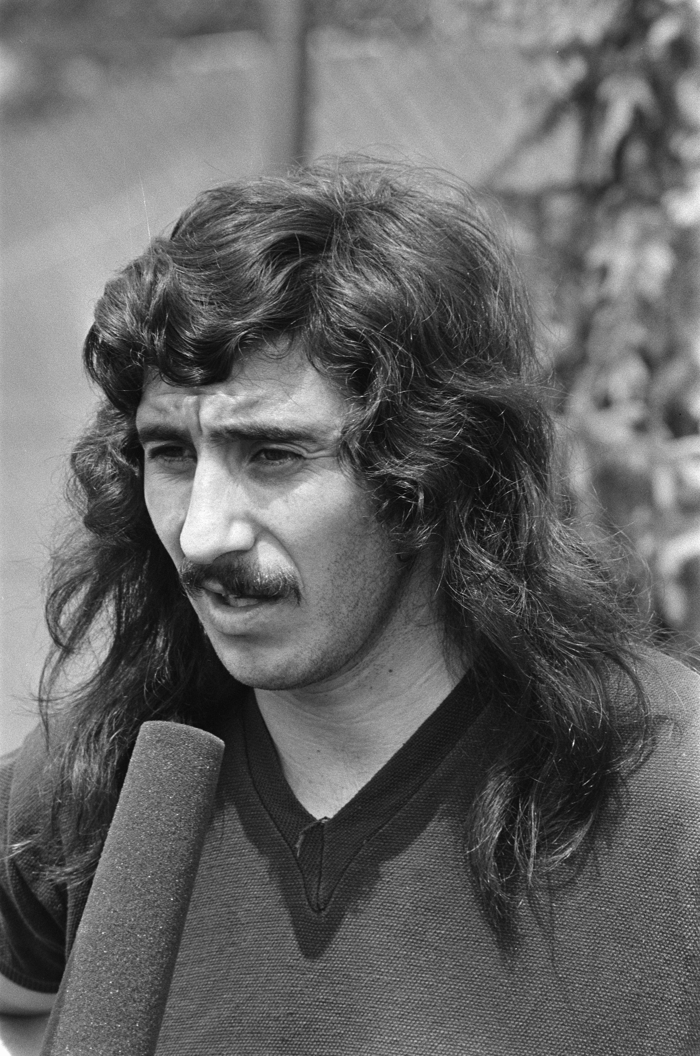 Collectie / Archief : Fotocollectie Anefo Reportage / Serie : [ onbekend ] Beschrijving : WK voetbal 1974; Argentijnen in trainingskamp, Ayala (kop) Datum : 25 juni 1974 Trefwoorden : sport, trainingskampen, voetbal Fotograaf : Verhoeff, Bert / Anefo Auteursrechthebbende : Nationaal Archief Materiaalsoort : Negatief (zwart/wit) Nummer archiefinventaris : bekijk toegang 2.24.01.05 Bestanddeelnummer : 927-2805